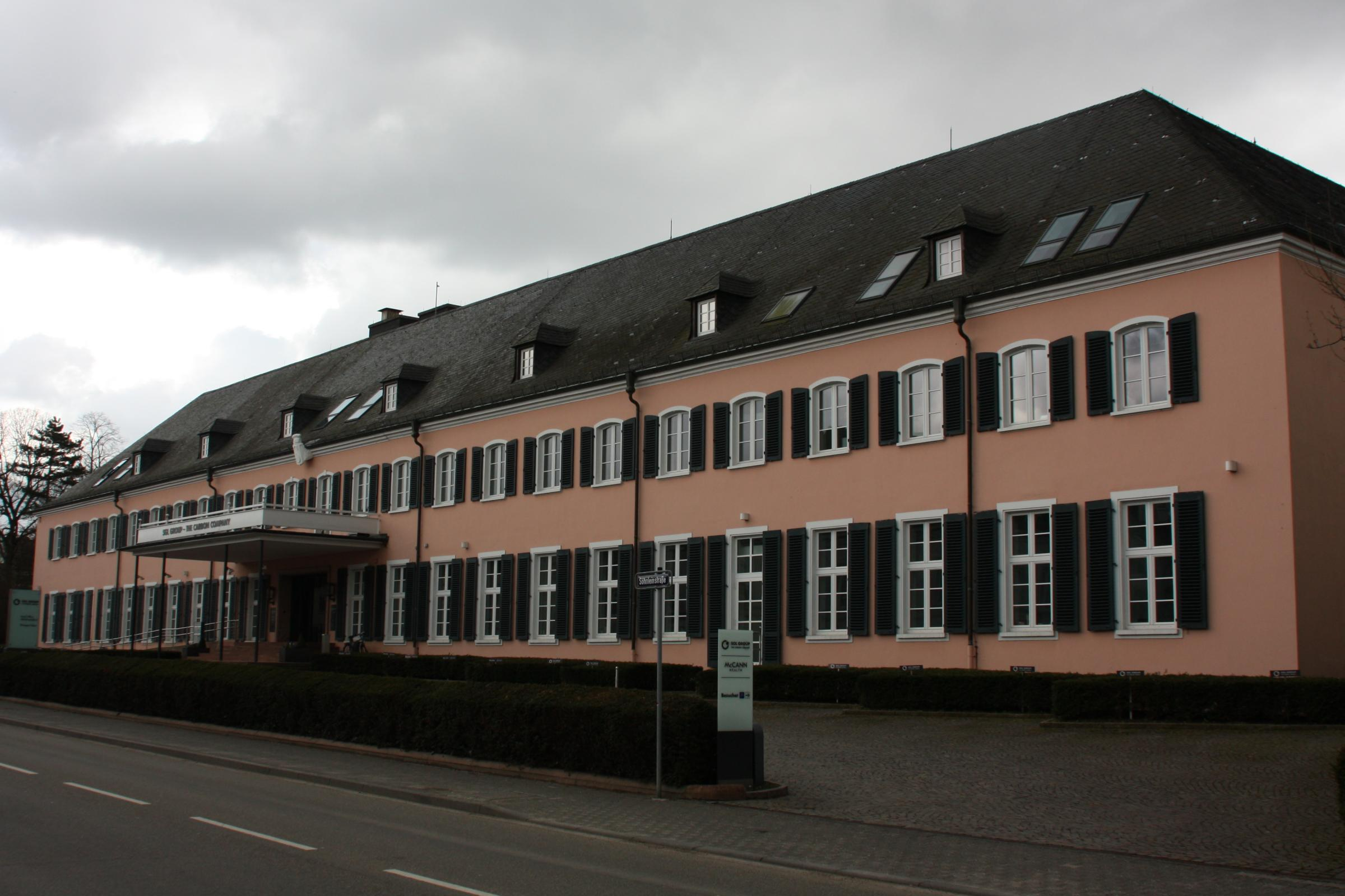 Das Gebäude der ehemaligen Söhnlein Kelterrei in Schierstein Hessen. Heute Hauptsitz der SGL-Carbon-Gruppe